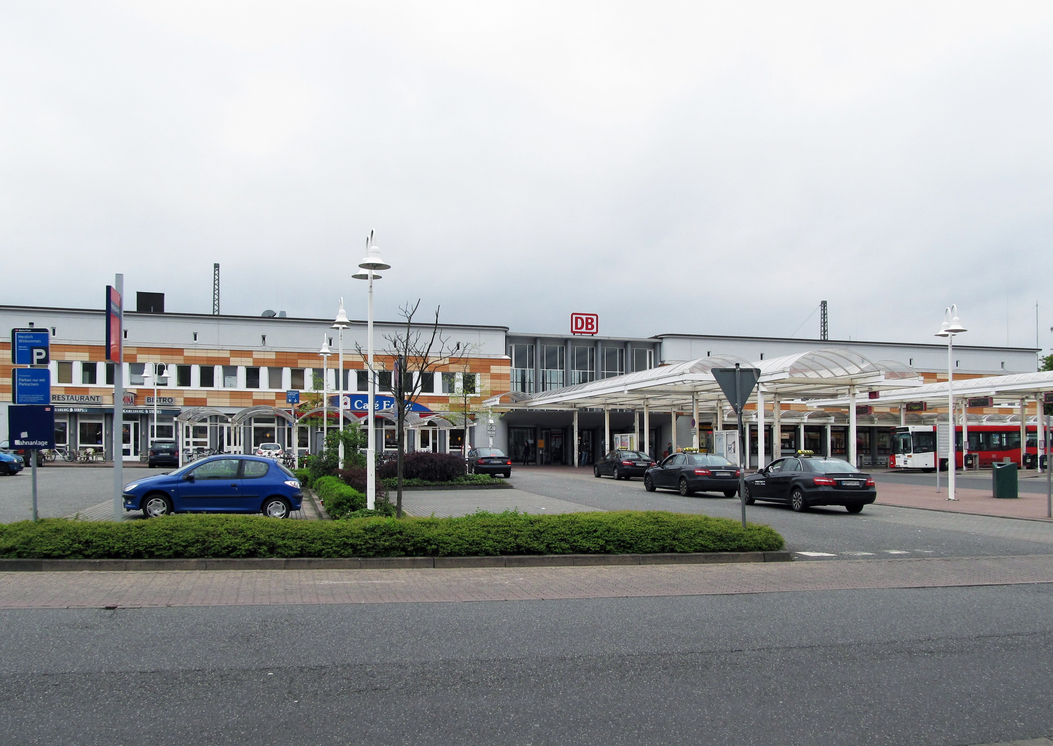 Blick auf den Hauptbahnhof Homburg/Saar